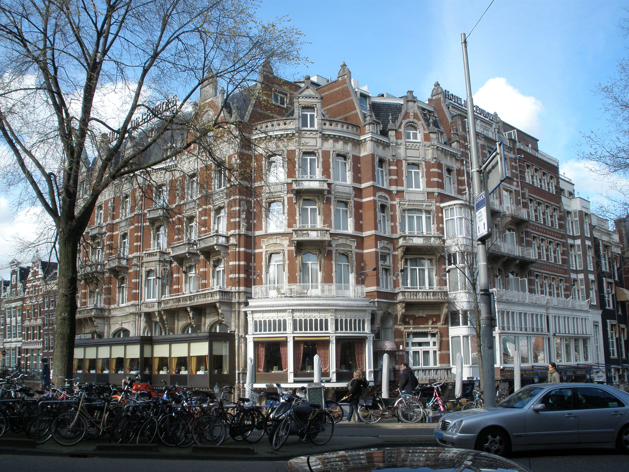 Hotel de l'Europe, Amsterdam, seen from the Amstel